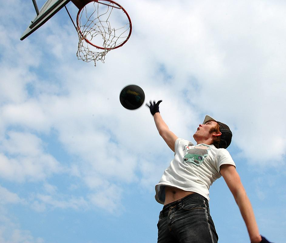 Basketball outside.